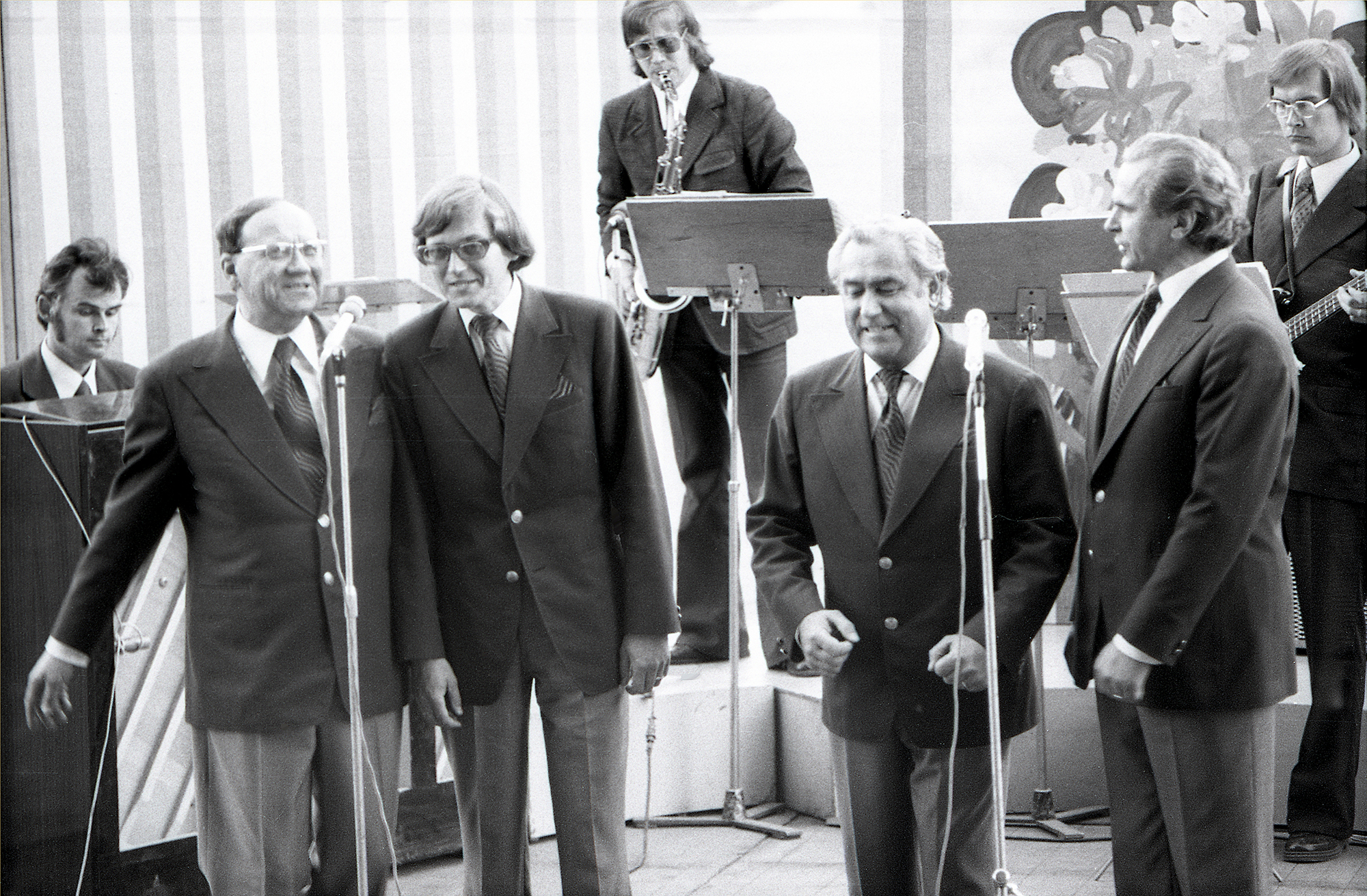 RAM-1: Georg Metsalu, I tenor, Tiit Köster, II tenor, Evald Jaansoo, bariton, Raimond Alango, bass